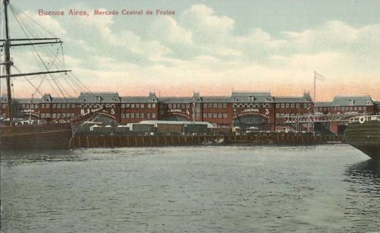 Vista del Mercado Central de Frutos en Avellaneda, Buenos Aires, desde el Riachuelo.